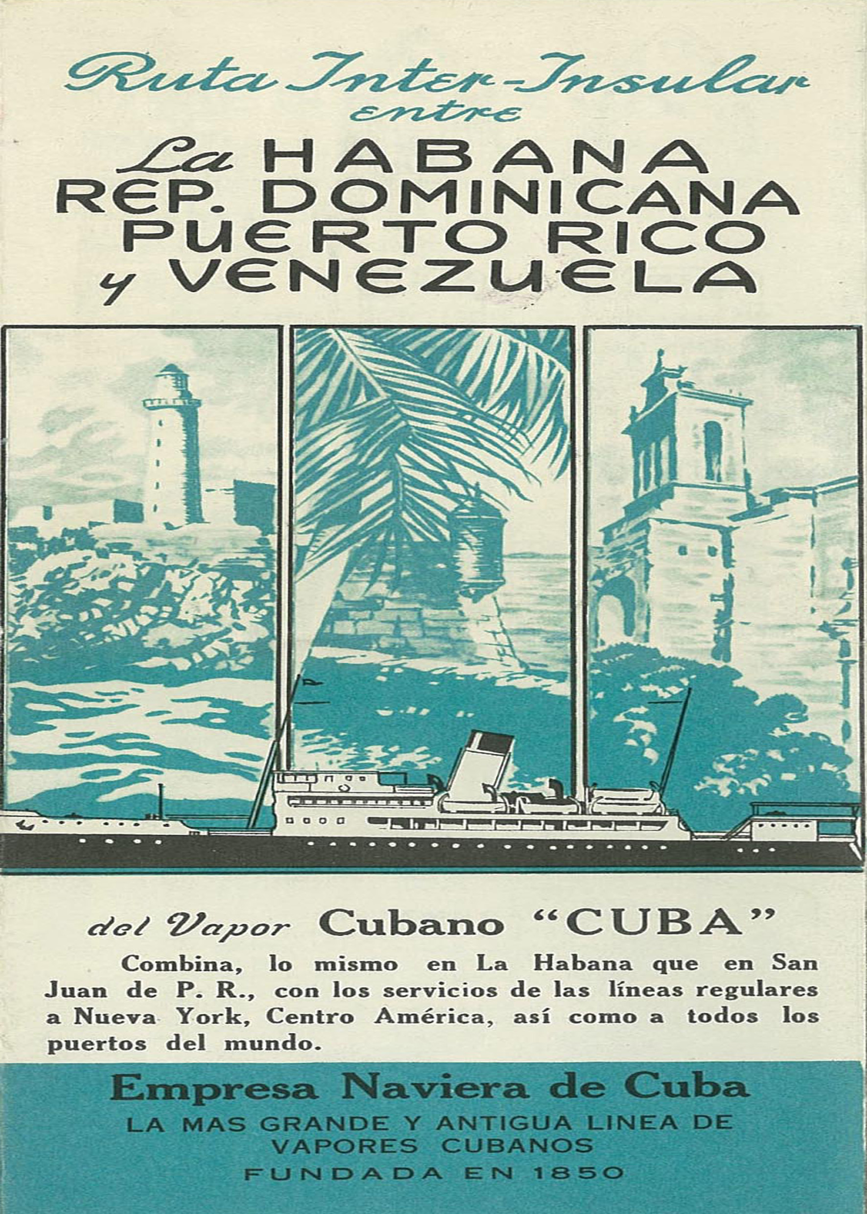 El Vapor "Cuba" se mantuvo navegando hasta la década del 40 del pasado siglo, y en su ruta cubría puertos de Cuba y el área del Caribe, con el itinerario siguiente: Ida: saliendo de La Habana, a Santiago de Cuba, Santo Domingo (llamada entonces Ciudad Trujillo), San Juan (Puerto Rico), Curaçao (entonces Antillas Neerladesas), La Guaira (Venezuela). Regreso: saliendo de La Guaira, a San Juan, Santo Domingo, La Habana.